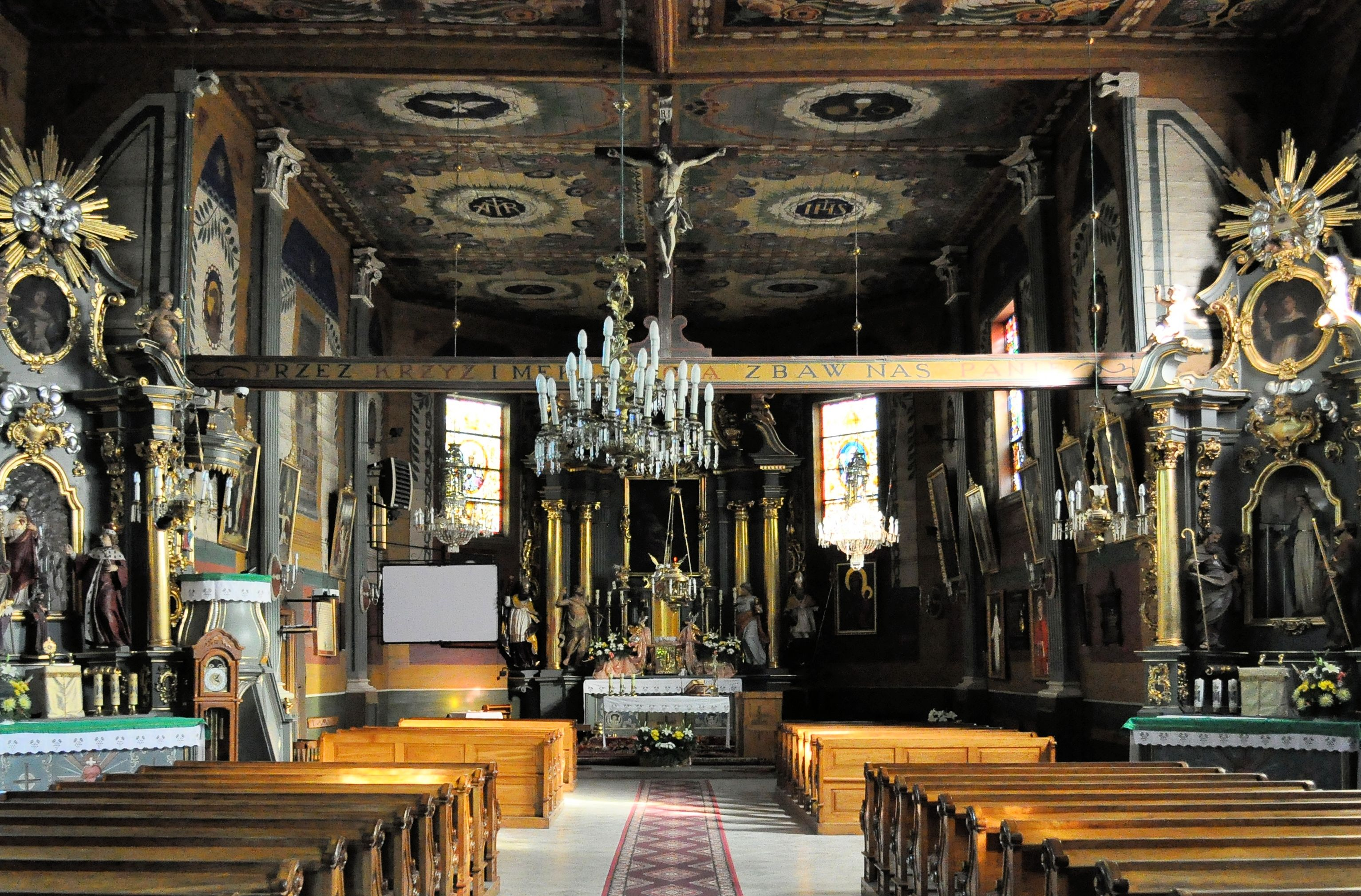 Kościół św. Wojciecha w Gawłuszowicach